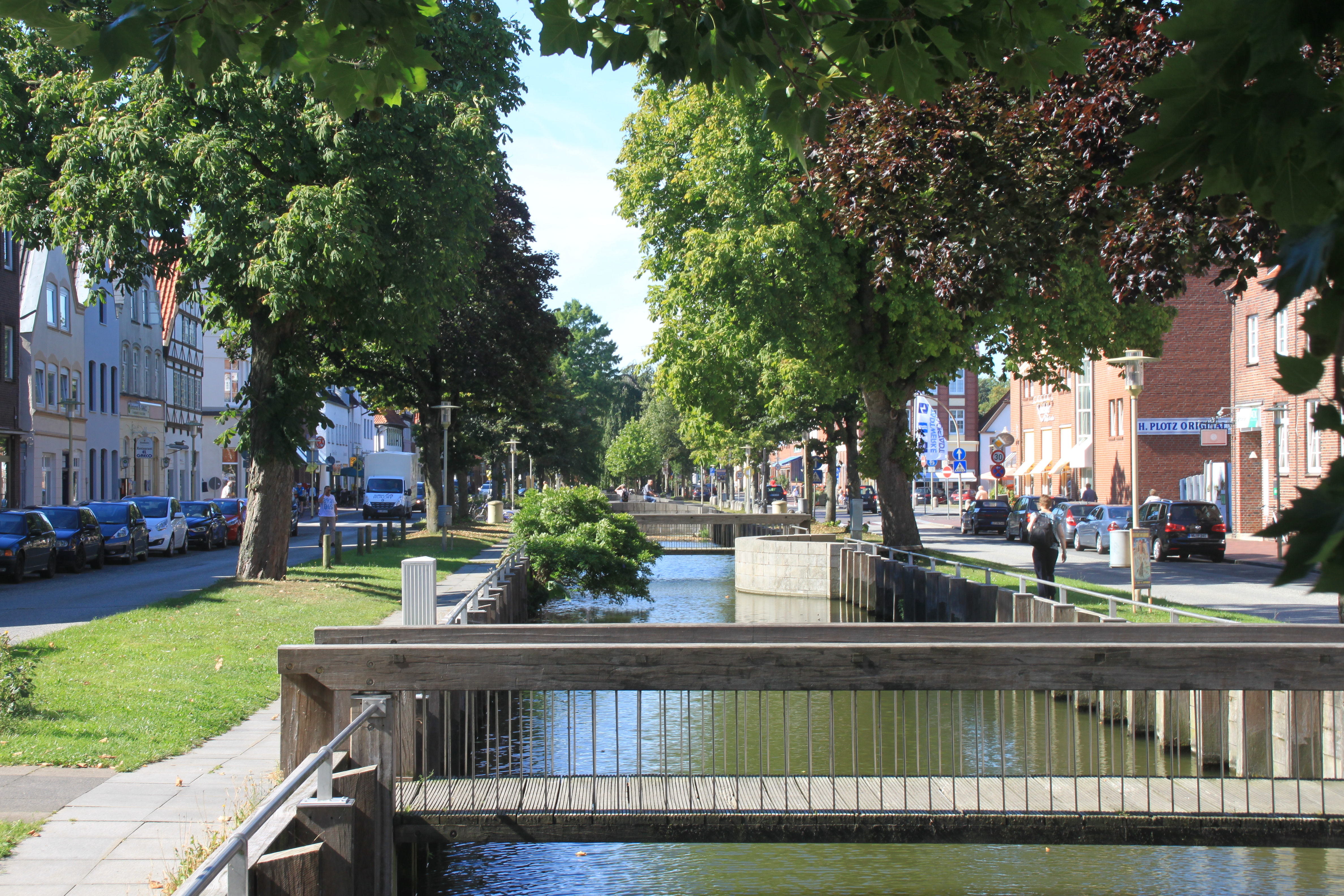 Das Fleth in Höhe Marktplatz